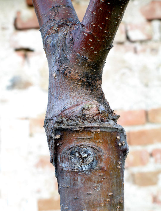 Description = Zweijährige Geißfußveredelung (Apfelbaum) Source = photo taken by Kobako Date = Dec. 2005 Author = Kobako